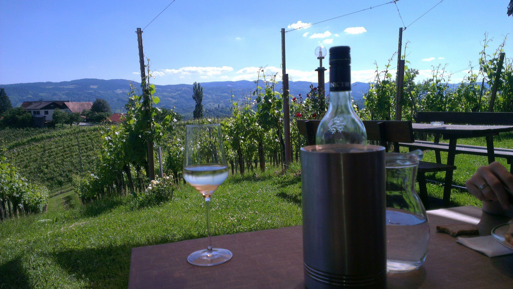 Blick auf die südsteirischen Weinberge